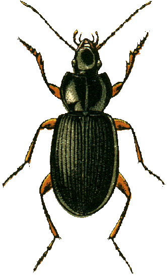 This file has been extracted from another file: Jacobs08.jpg